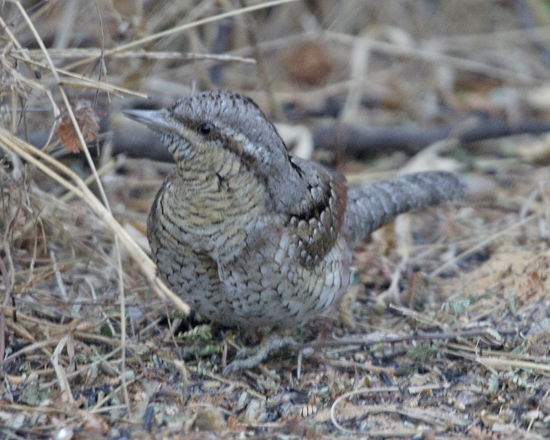 Eurasian Wryneck Jynx torquilla, 5 January 2009, Jhalana Dungri, Jaipur, India 690V7985